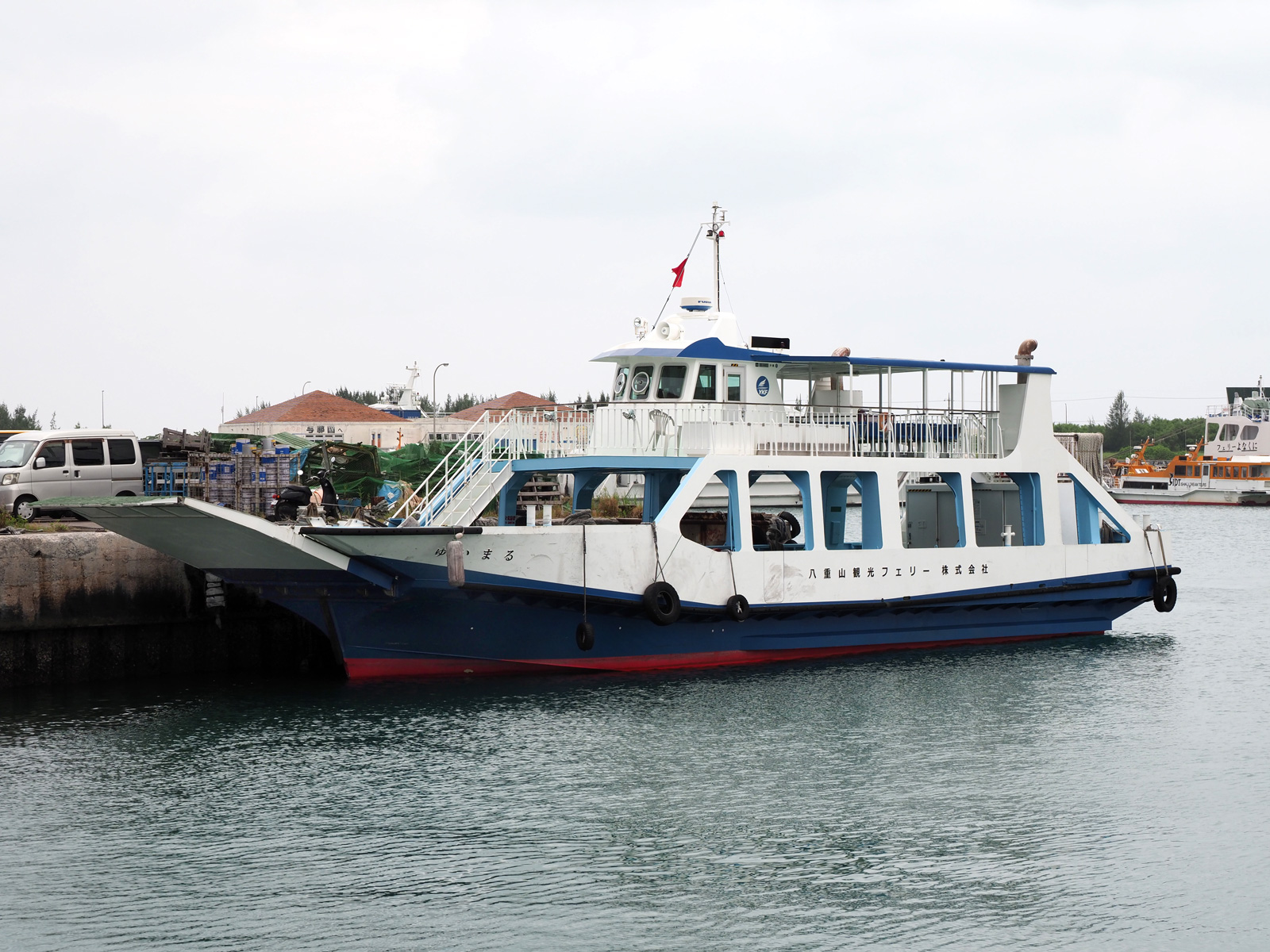 ゆいまる（八重山観光フェリー、石垣港にて）